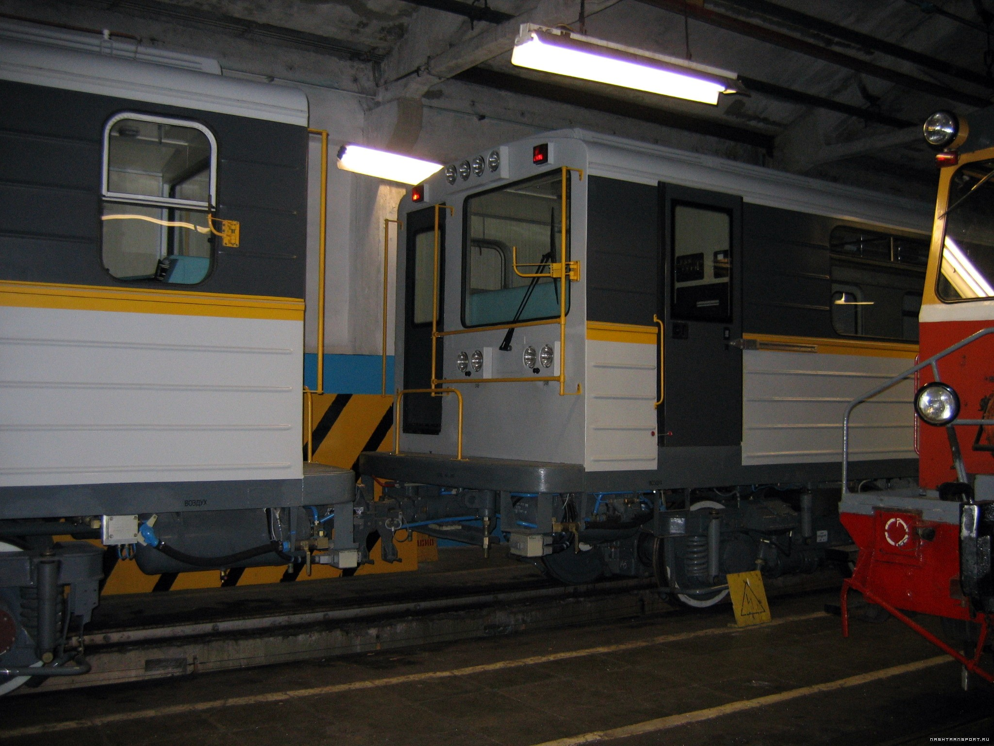 Грузопассажирские автомотрисы с краном модели 81-730.05. Построены в 2008 году для линии Д6 (метро-2)